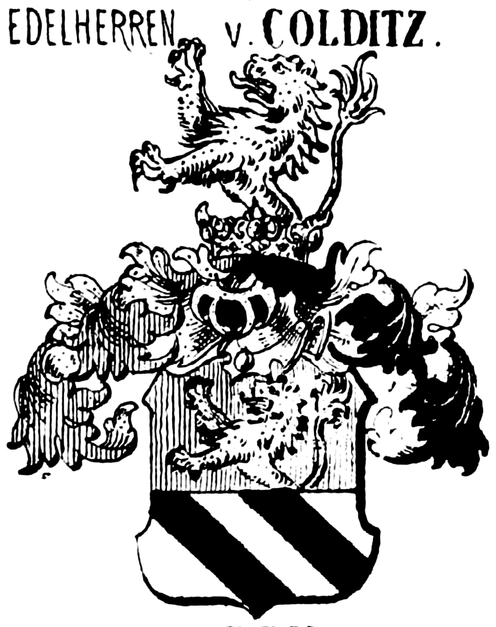 Stammwappen derer von Colditz